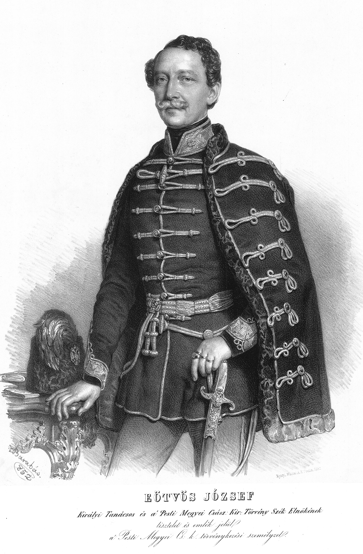 Vásárosnaményi báró Eötvös József (Buda, 1813. szeptember 3. – Pest, 1871. február 2.) magyar jogász, író, a Batthyány-kormány, majd az Andrássy-kormány vallás- és közoktatásügyi minisztere, a Magyar Tudományos Akadémia és a Kisfaludy Társaság elnöke, Eötvös Ignác politikus fia, Eötvös Loránd fizikus apja.